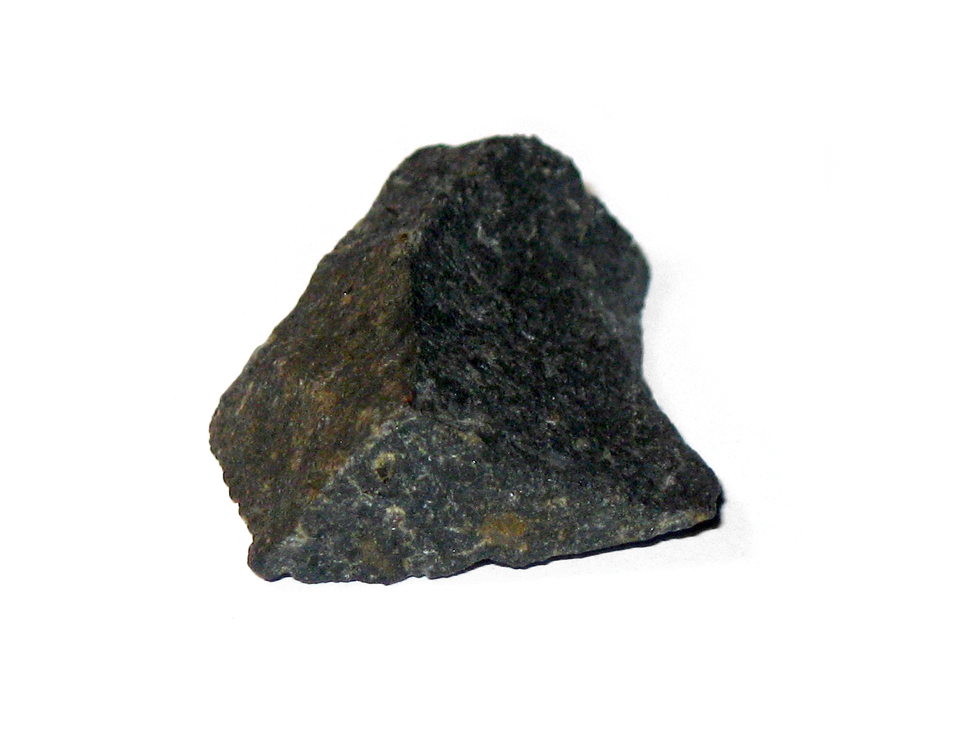 Kärnäiitin palanen.